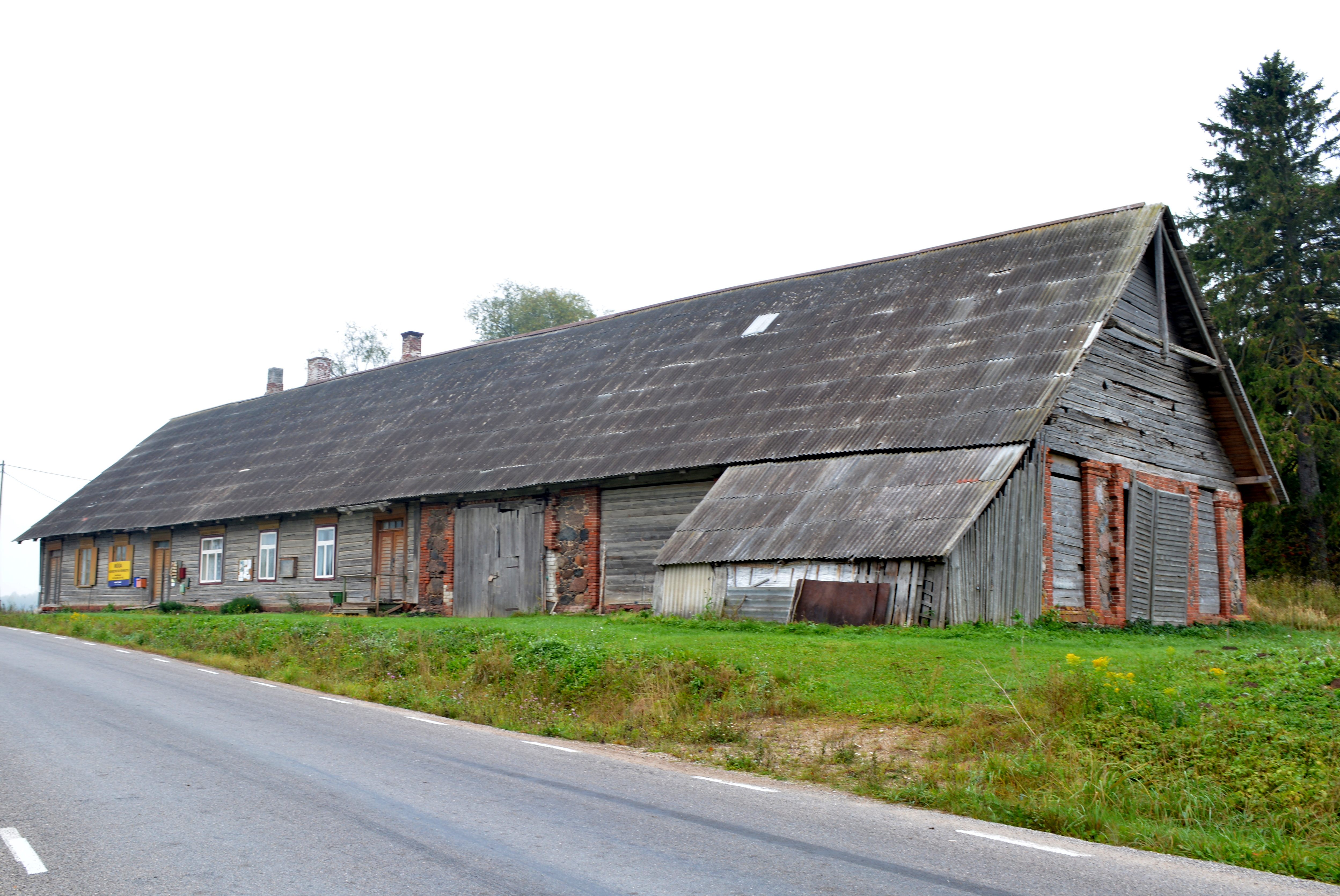 Kärsa kõrts